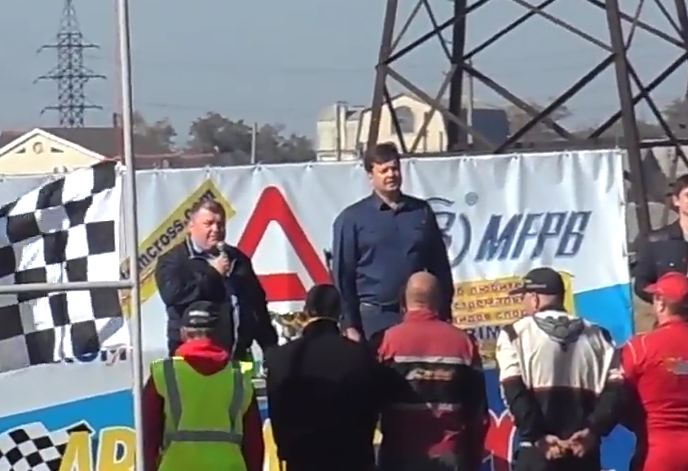 Автомотогонки